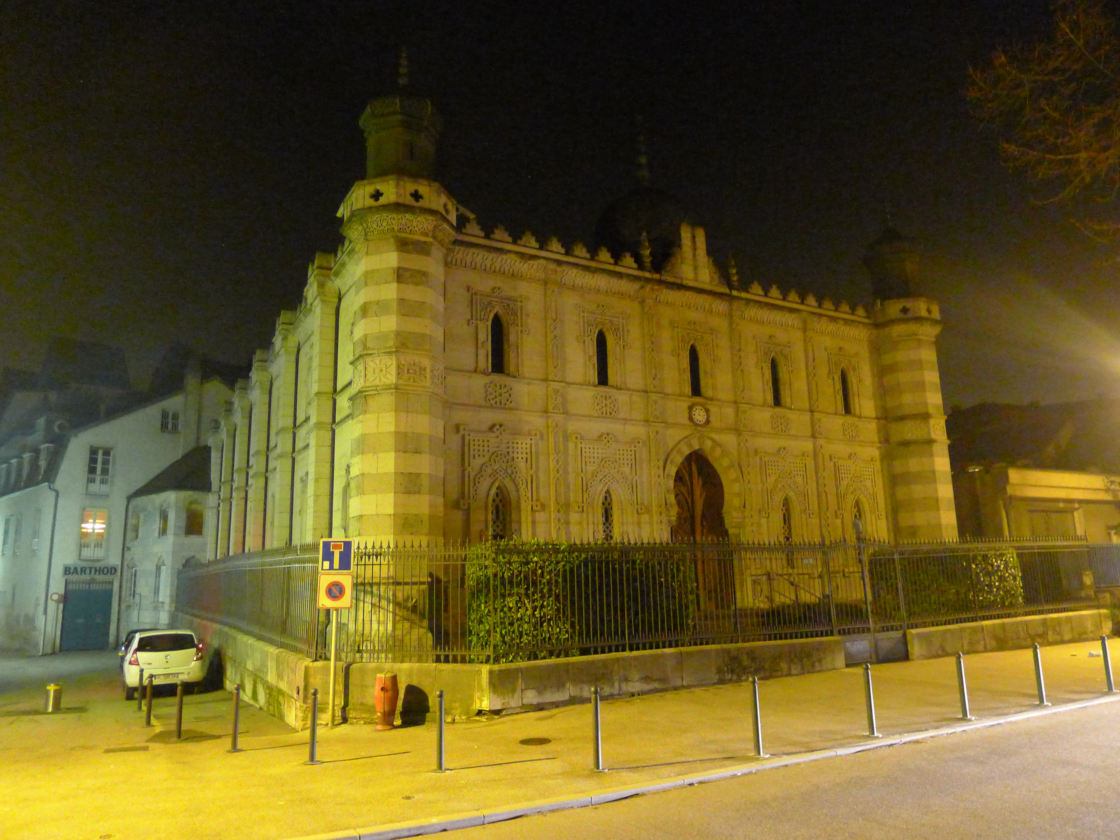 Besançon Synagogue nuit.jpg